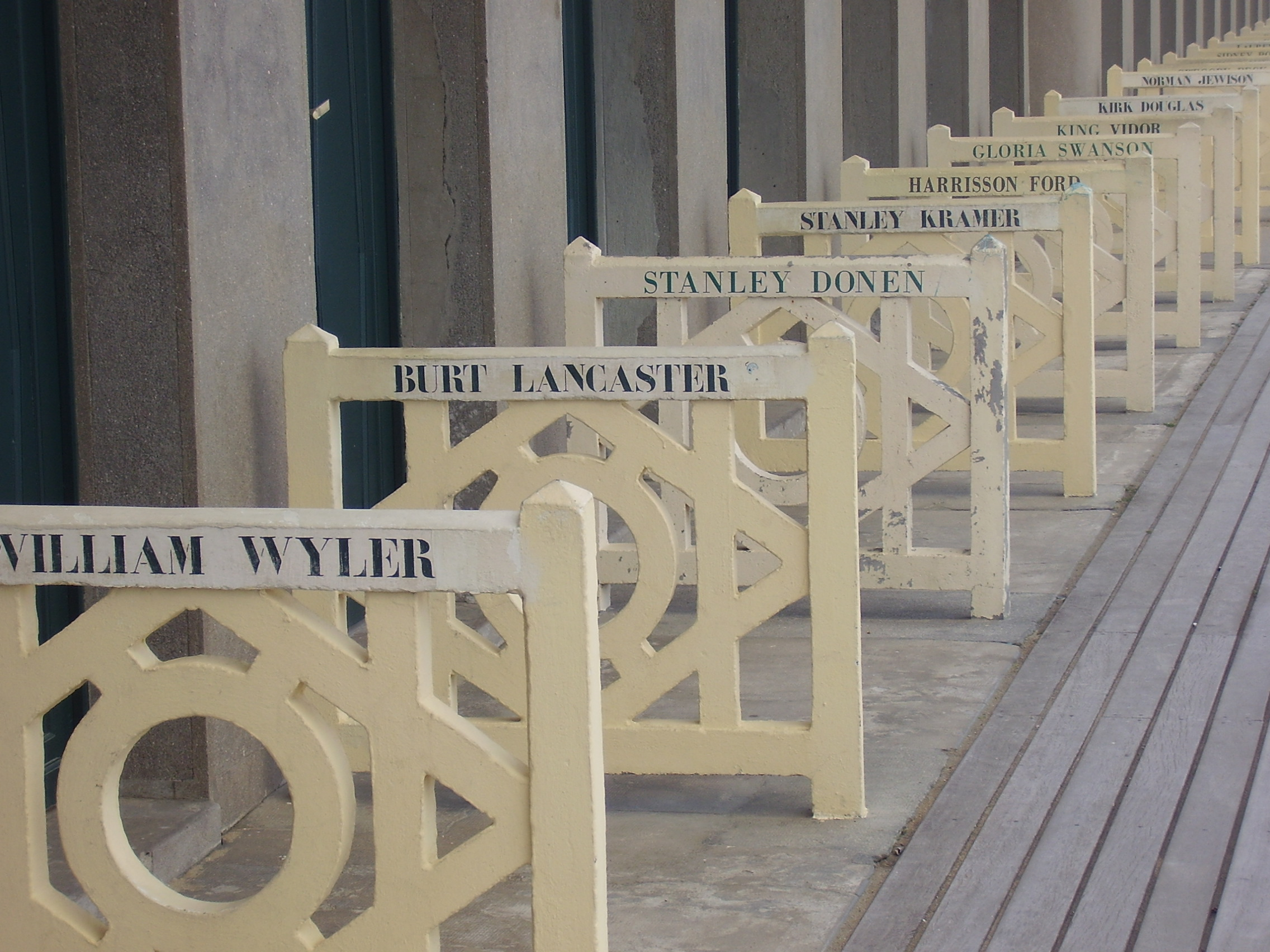 Deauville, Frankreich